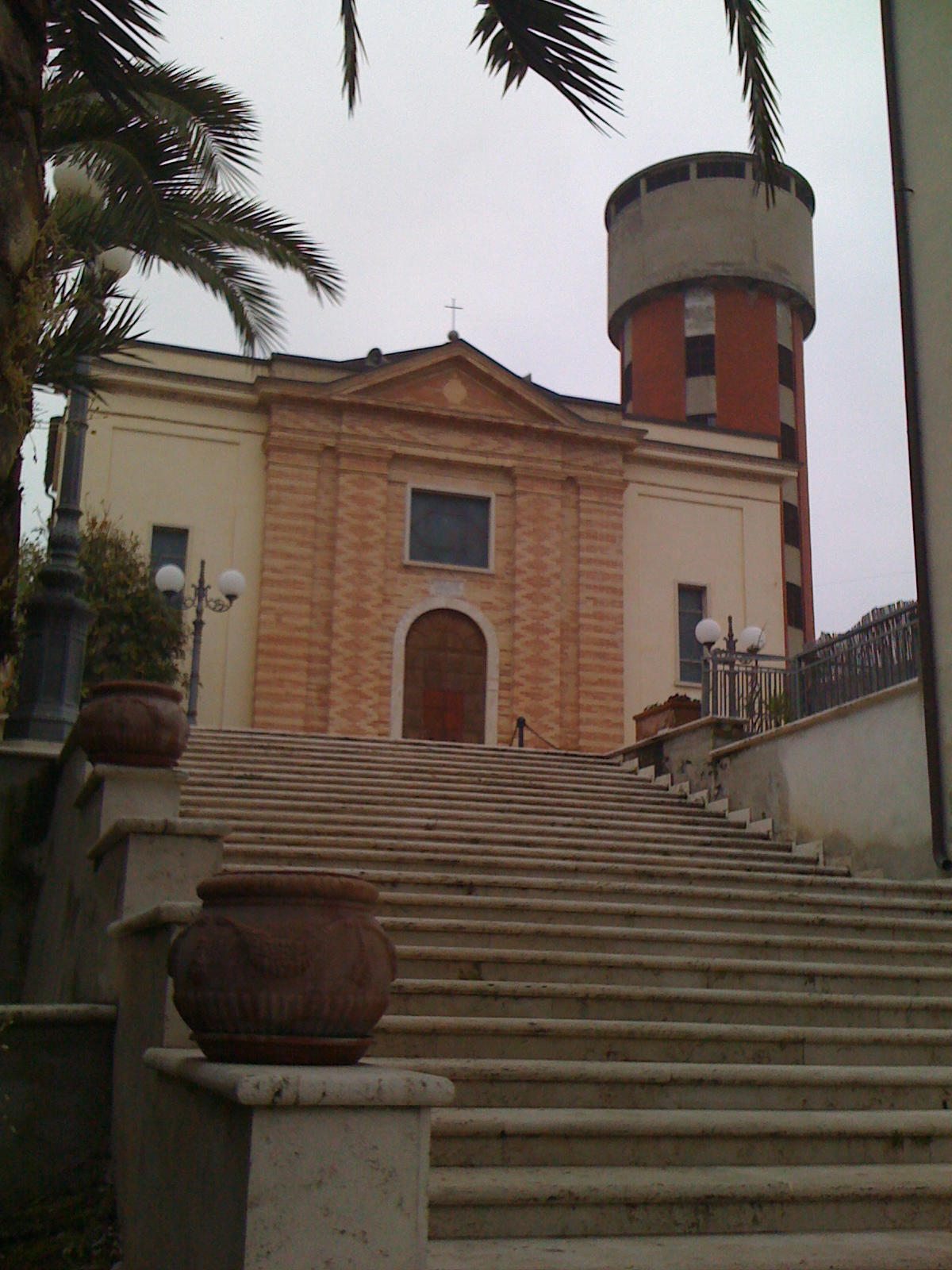 Chiesa di nostra MADONNA DELLE GRAZIE di Controguerra (Teramo)